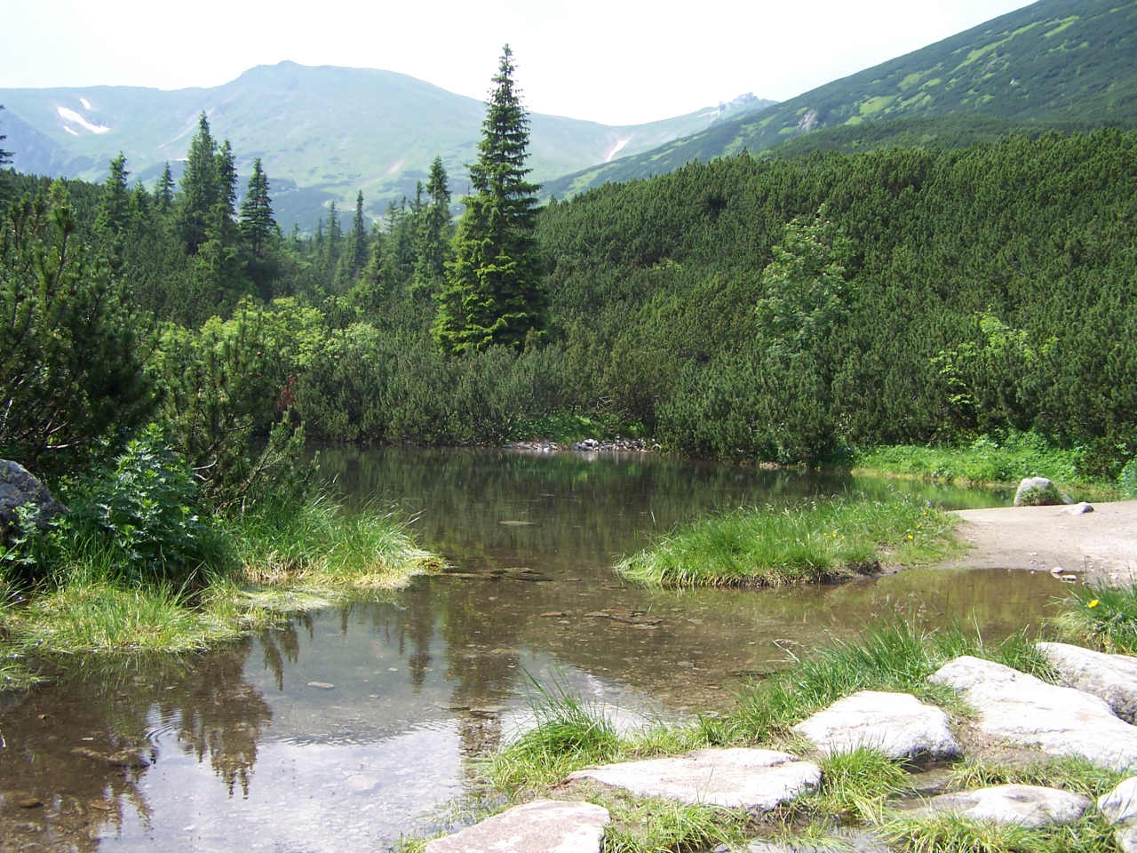 Hala Gąsienicowa (Tatra Mountains)